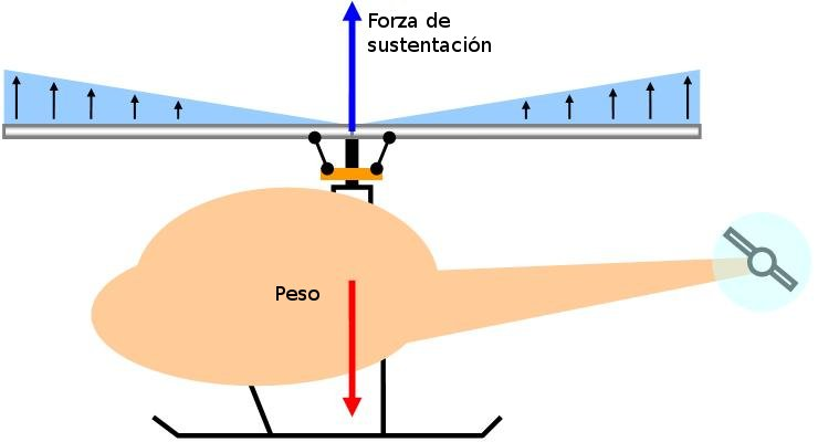 Esquema da sustentación dun helicóptero